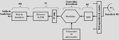 diagrama de bloques del radioreseptor